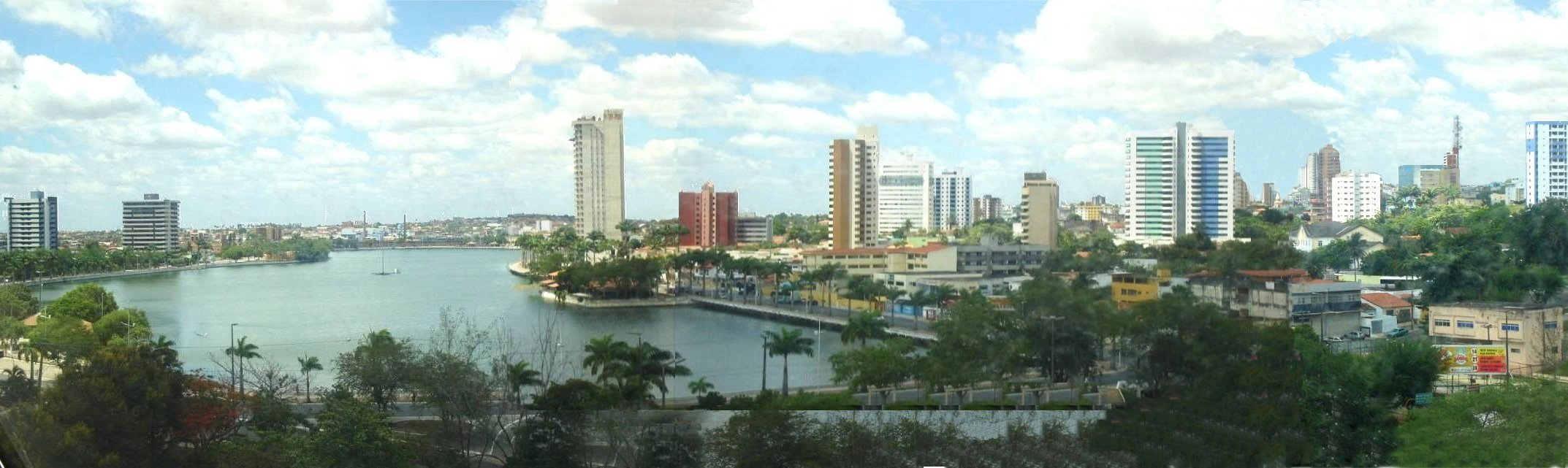 Vista Aérea do Açude Velho, Campina Grande, Paraíba, Brasil.